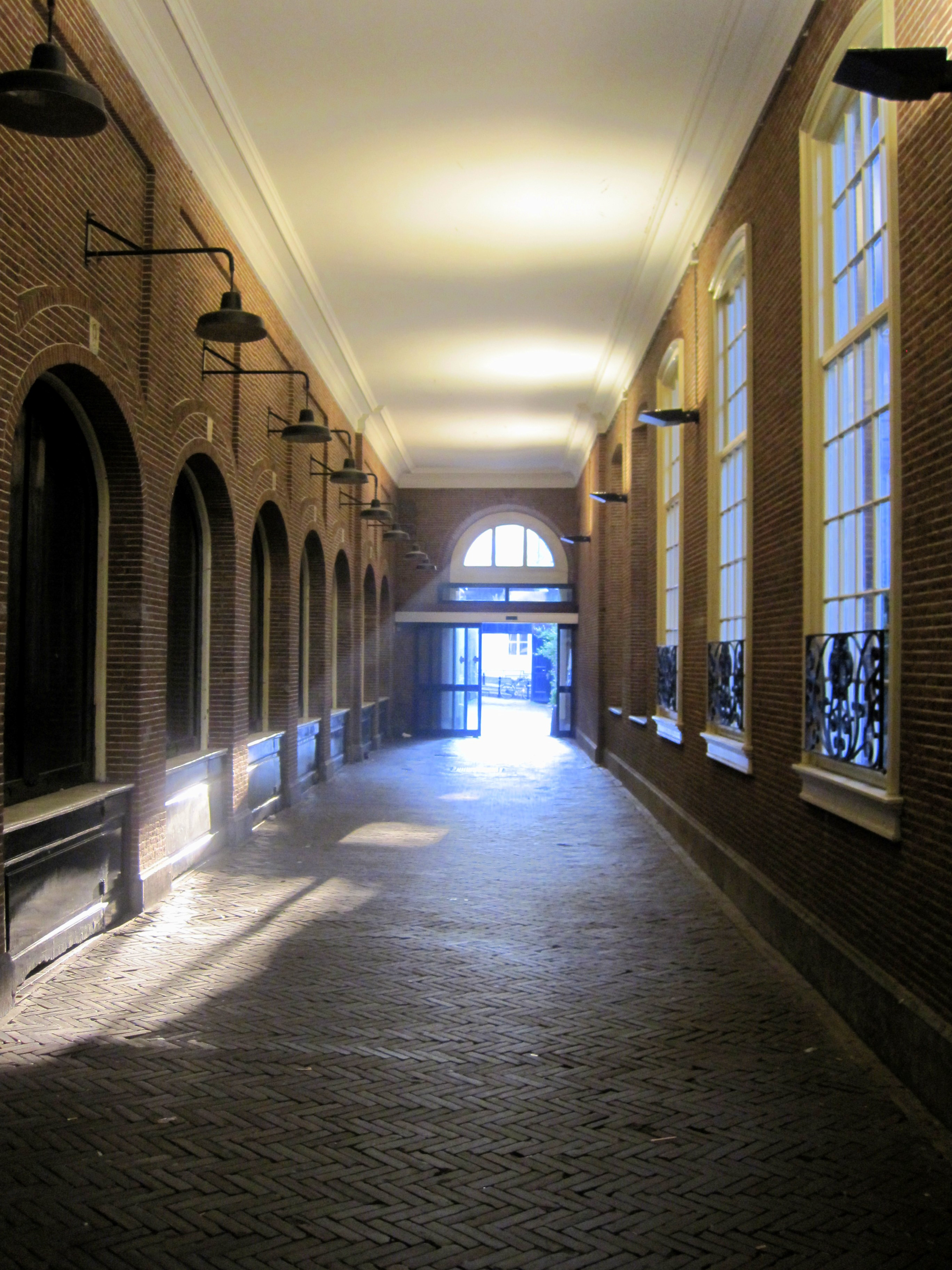 Zomer 2011